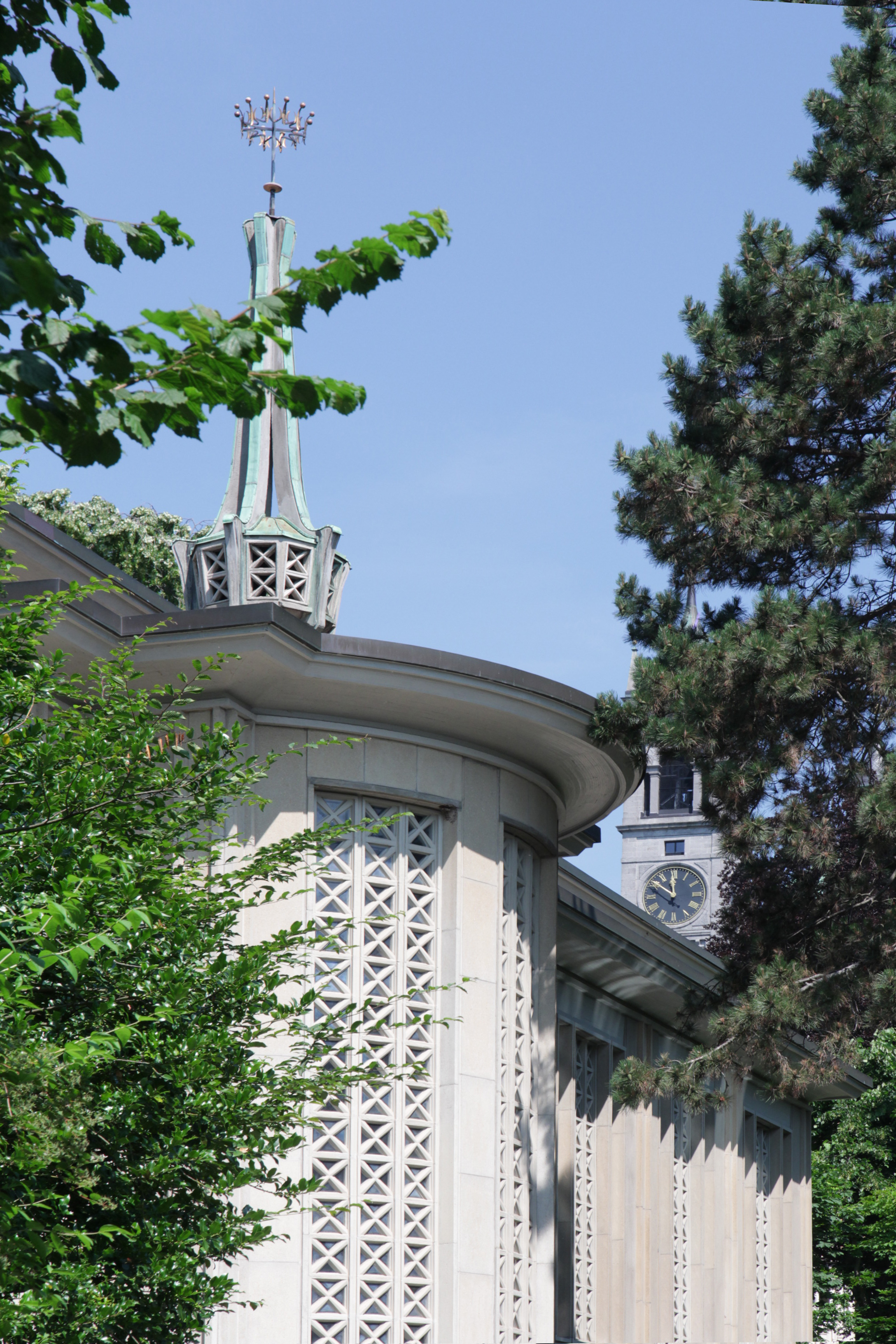 Römisch-katholische Kirche Dreikönigen, Zürich-Enge